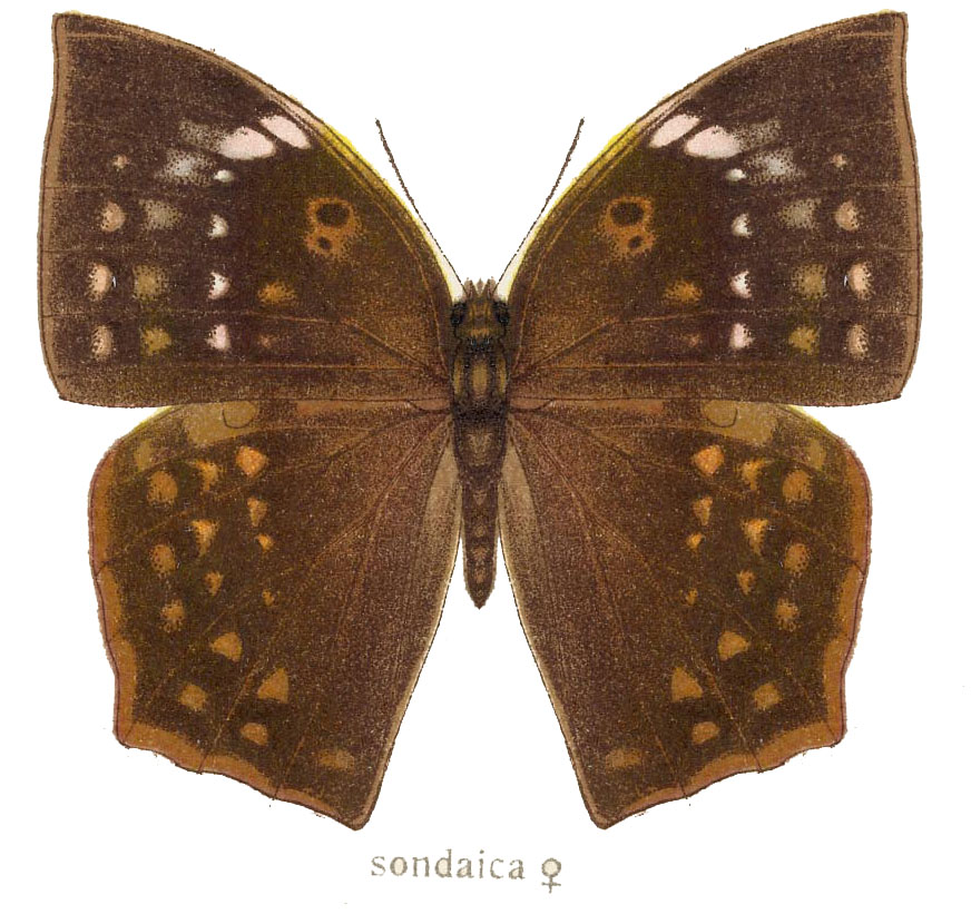 Discophora sondaica female